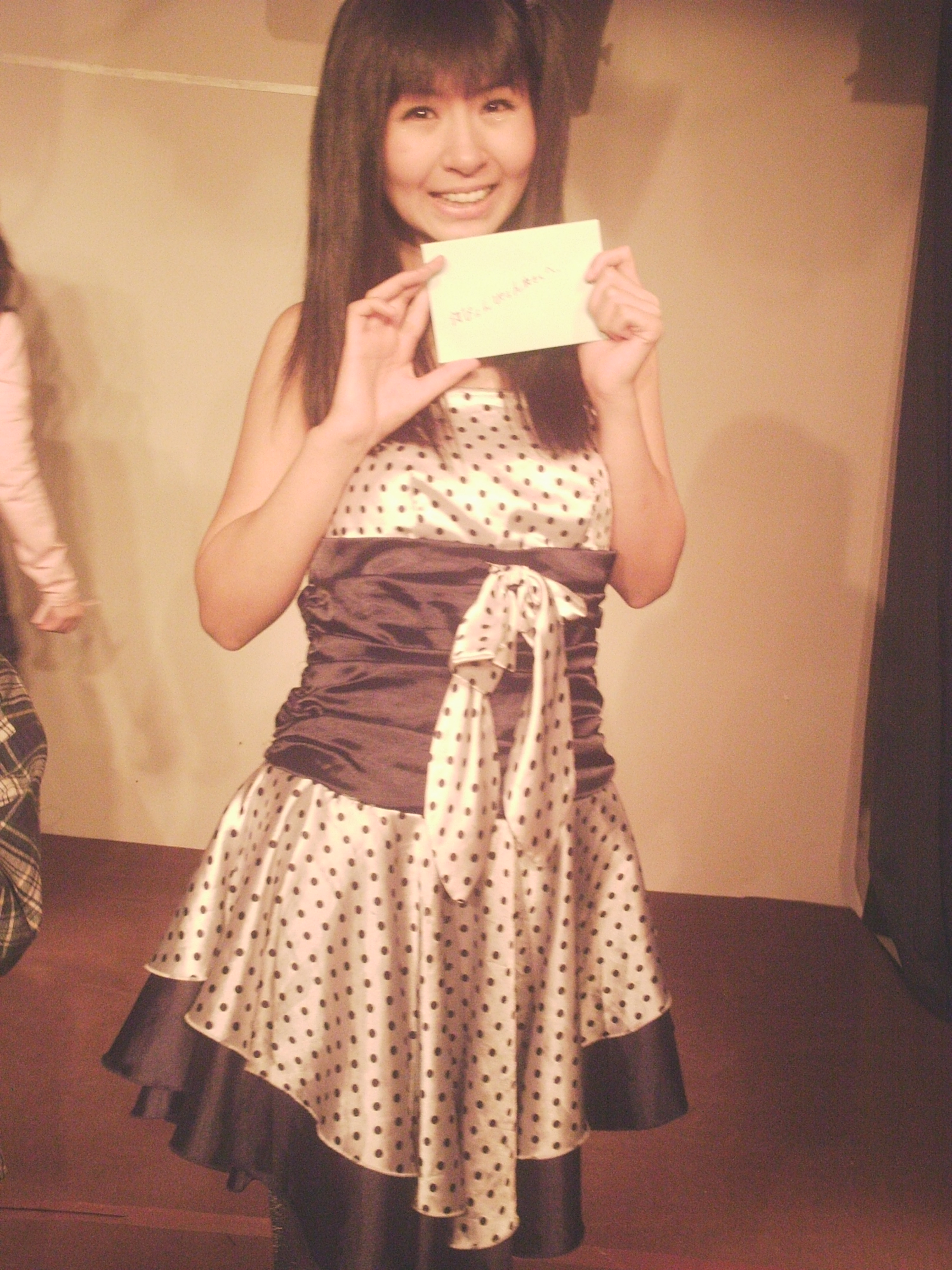 ぴょんぴょん (タレント 2010年3月)